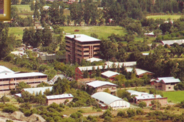 Universidad del valle, Campus tiquipaya 2006